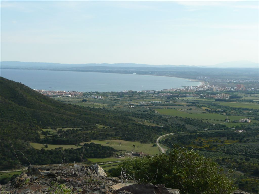 Castell de Bufalaranya (Roses, Alt Empordà). Vista del golf de Roses (S) des del recinte baix del castell.